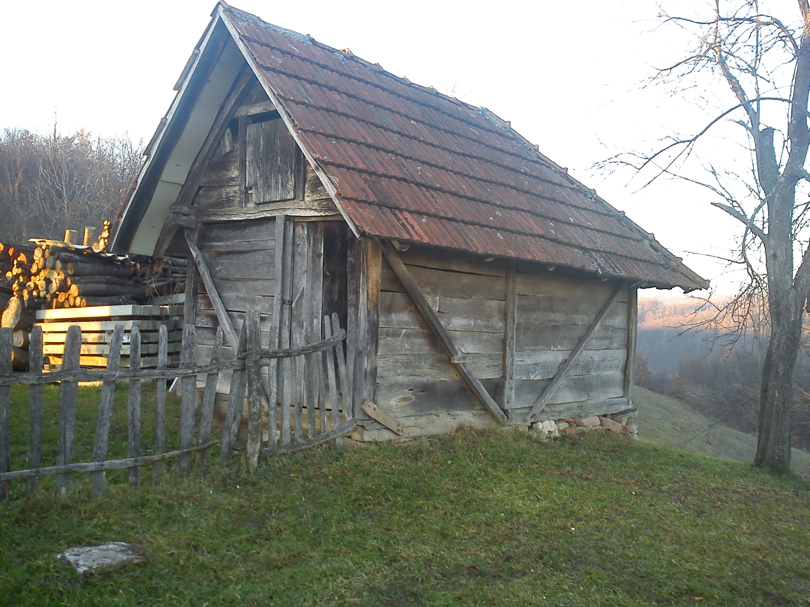 Selo Bistrica (BL)